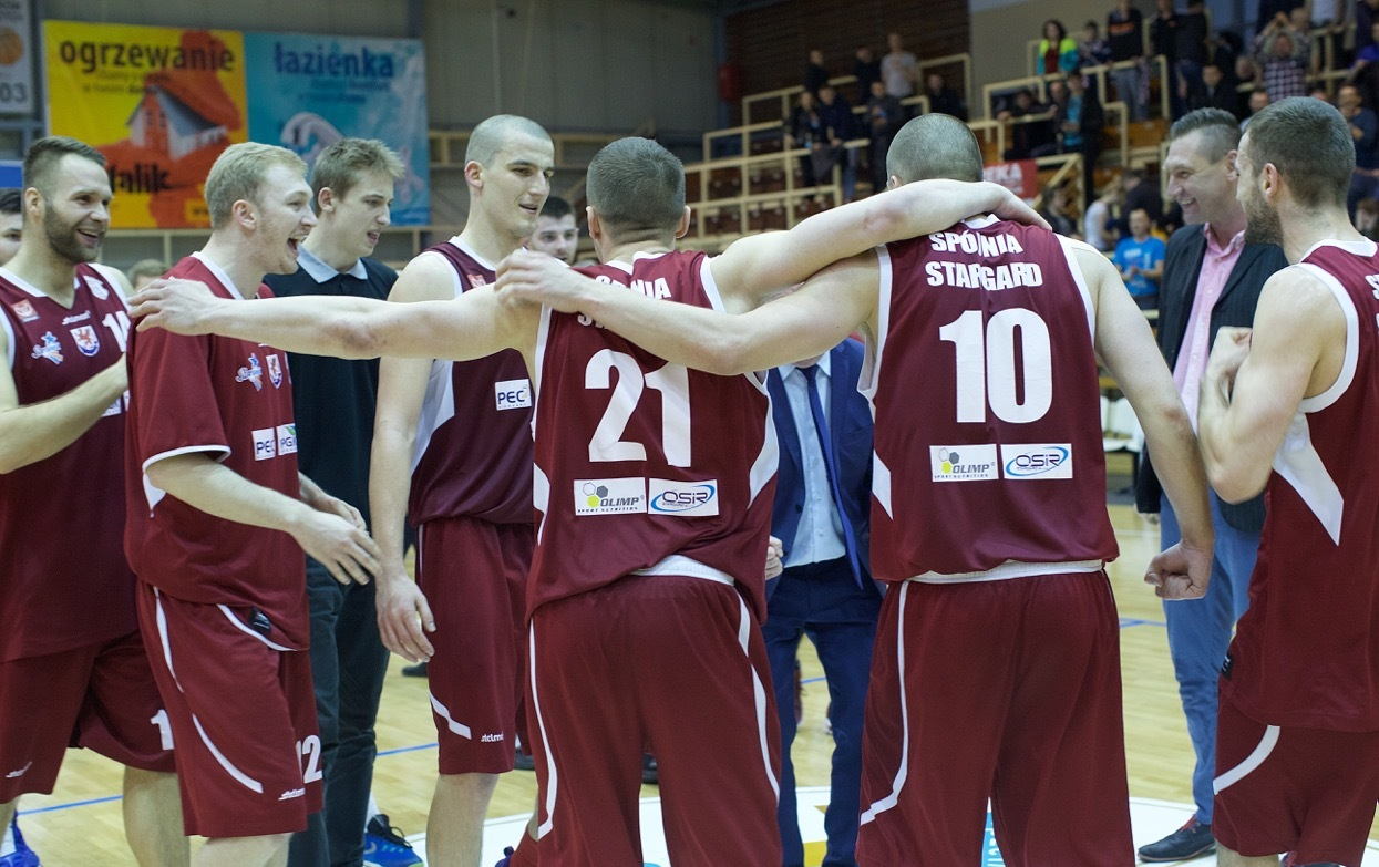 Spójnia Stargard w półfinale po meczu z GKS Tychy (23.04.2017)